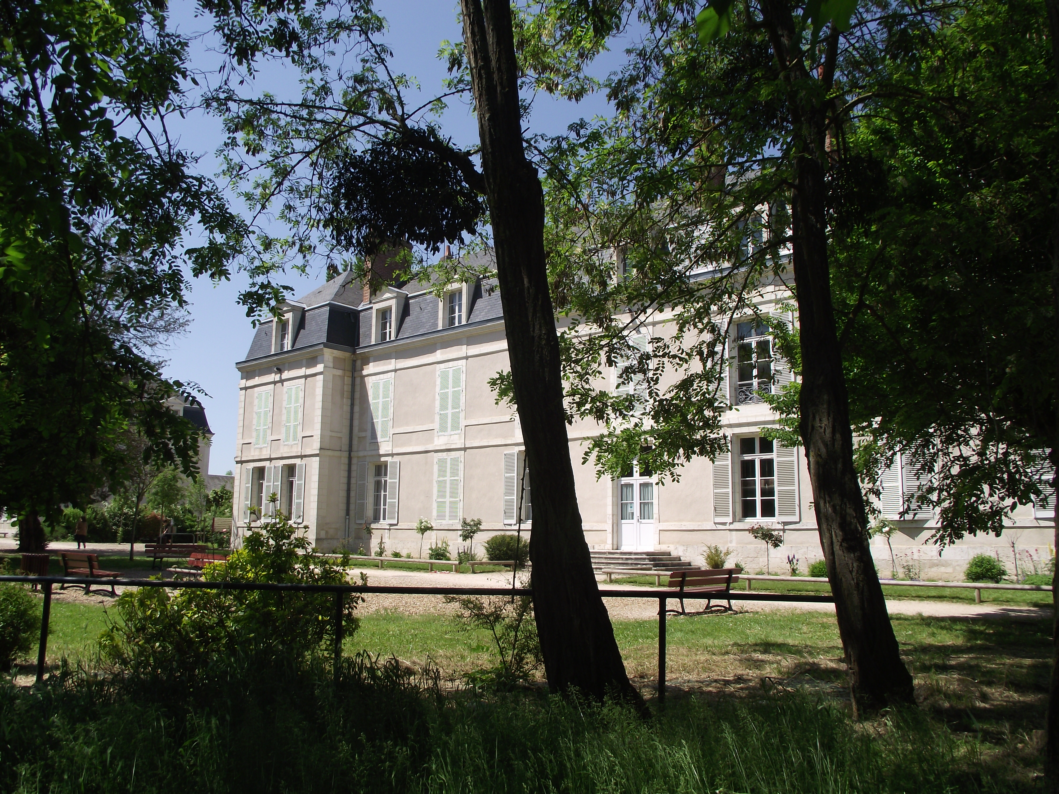 Villa Lunier - Actuel bâtiment Lunier de la cité scolaire Augustin-Thierry.